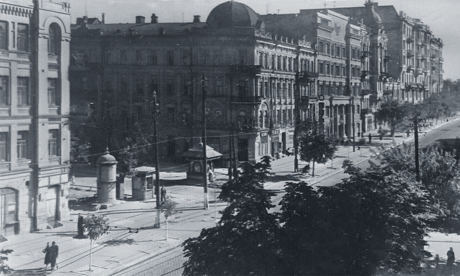 Жилий будинок, Київ, вул. Б. Хмельницького, 40/25